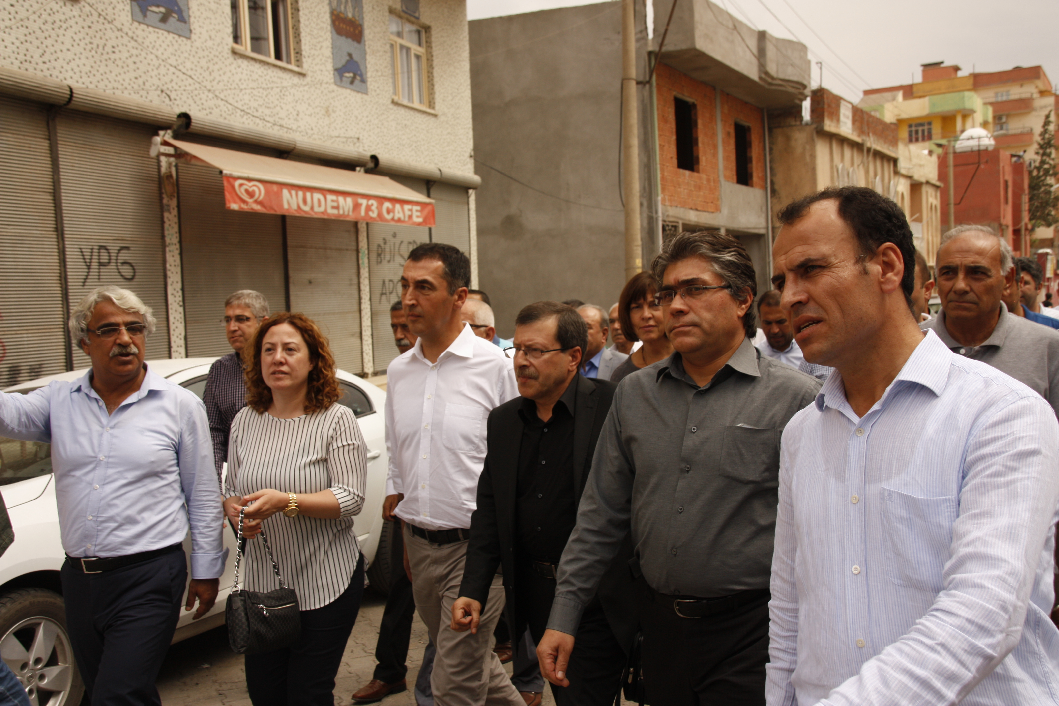 Birlik 90/Yeşiller eşbaşkanı Cem Özdemir, Cizre ziyareti